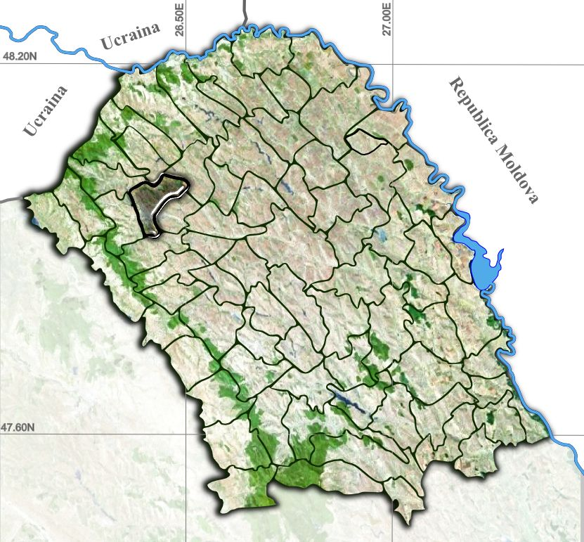 Dorohoi jud Botosani.